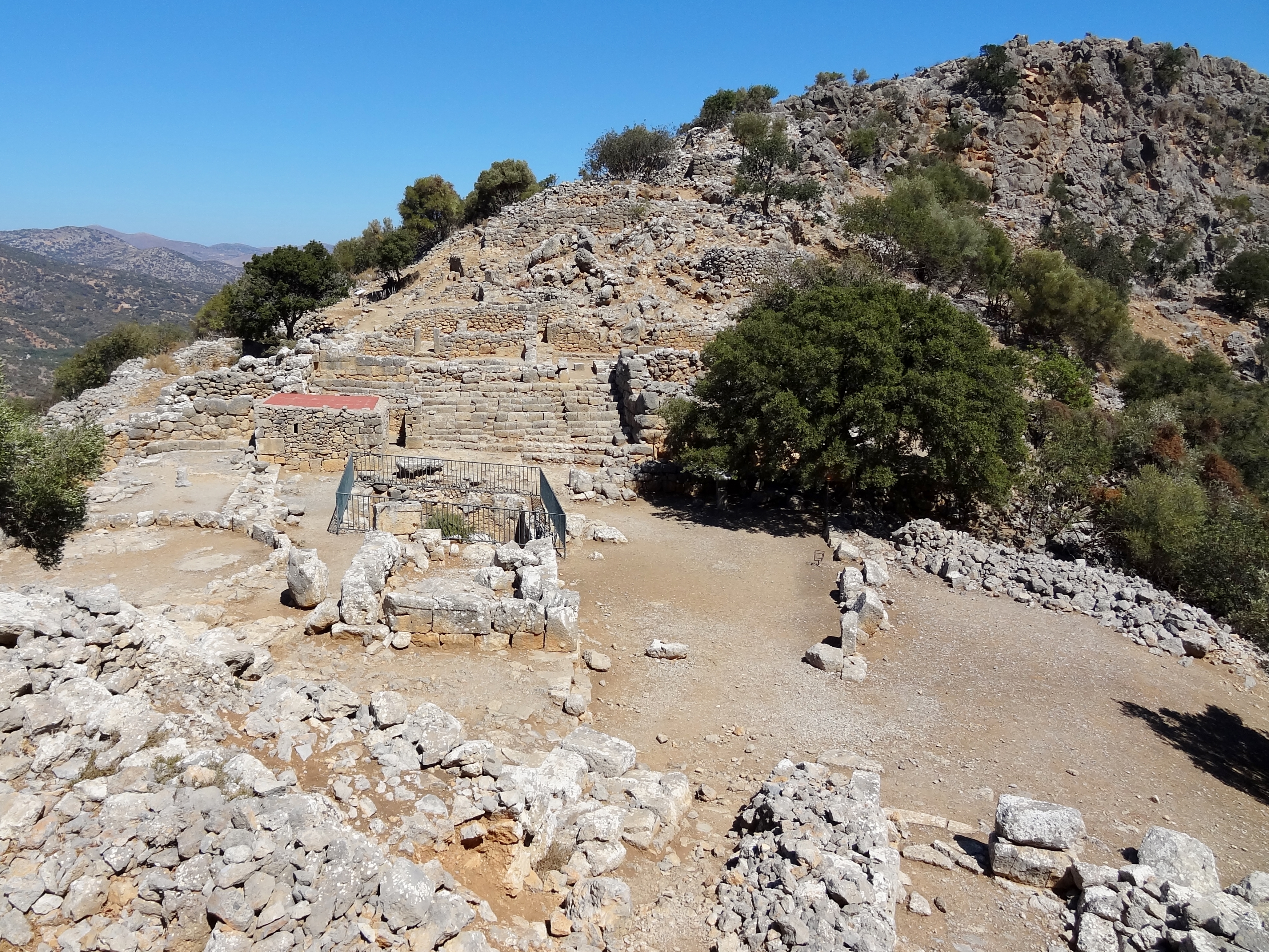 Agora der Ausgrabungsstätte von Lato (Λατώ), Gemeinde Agios Nikolaos, Kreta, Griechenland